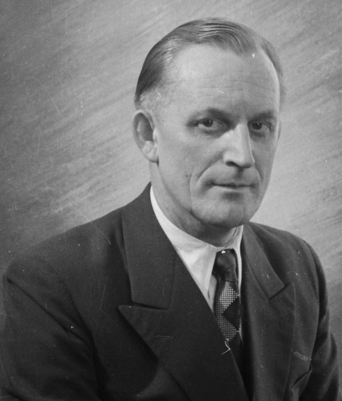 Portrait von Peter Neidhardt aus dem Jahre 1955, angefertigt in der Fotostelle des Werks für Fernmeldewesen.